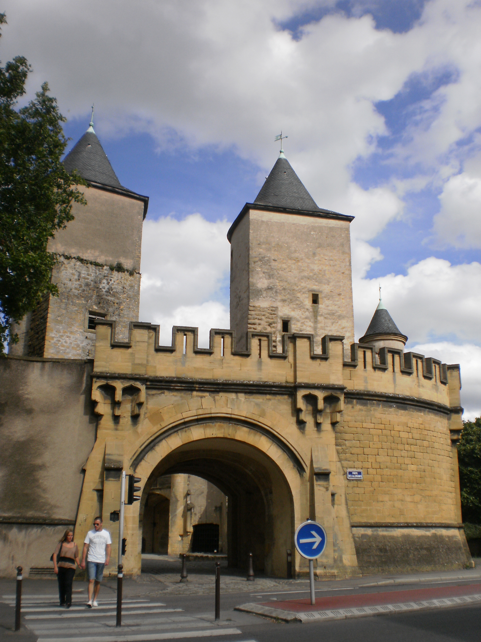 Ворота немцев в Меце